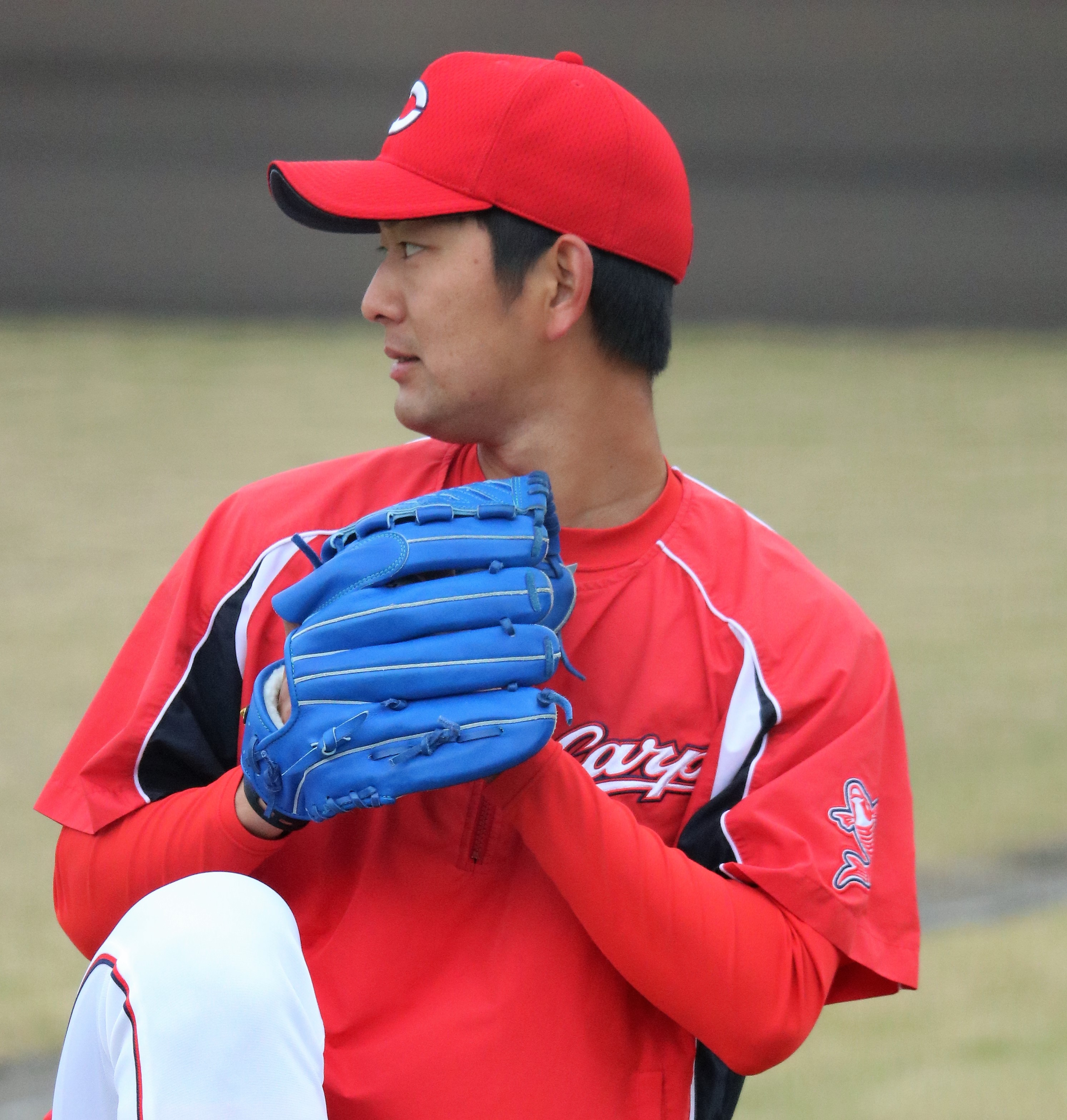 2017年11月20日 由宇練習場で撮影